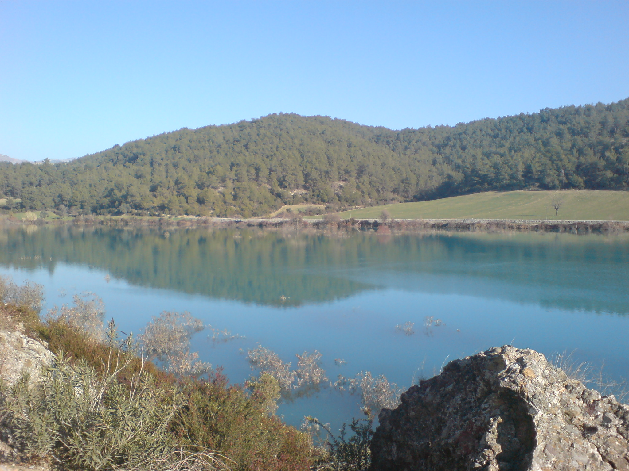 Adana'nın Aladağ ilçesine giderken Eğner Köyündeki barajın manzarası.